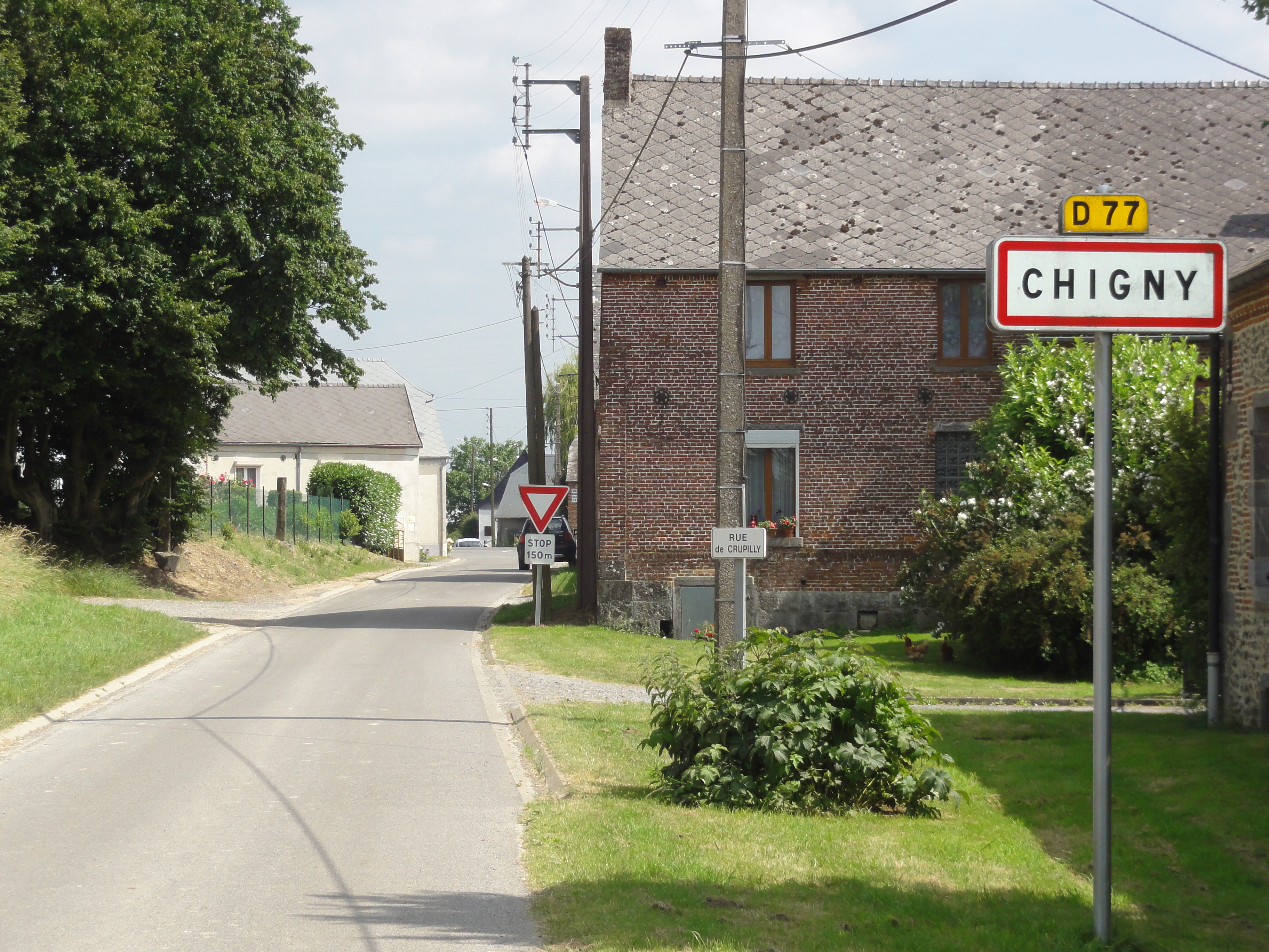 Chigny (Aisne) city limit sign